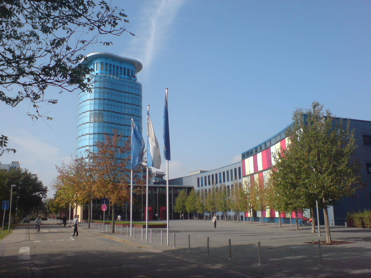 Fachhochschule Heidelberg, Science Tower (links) und Arc (rechts)